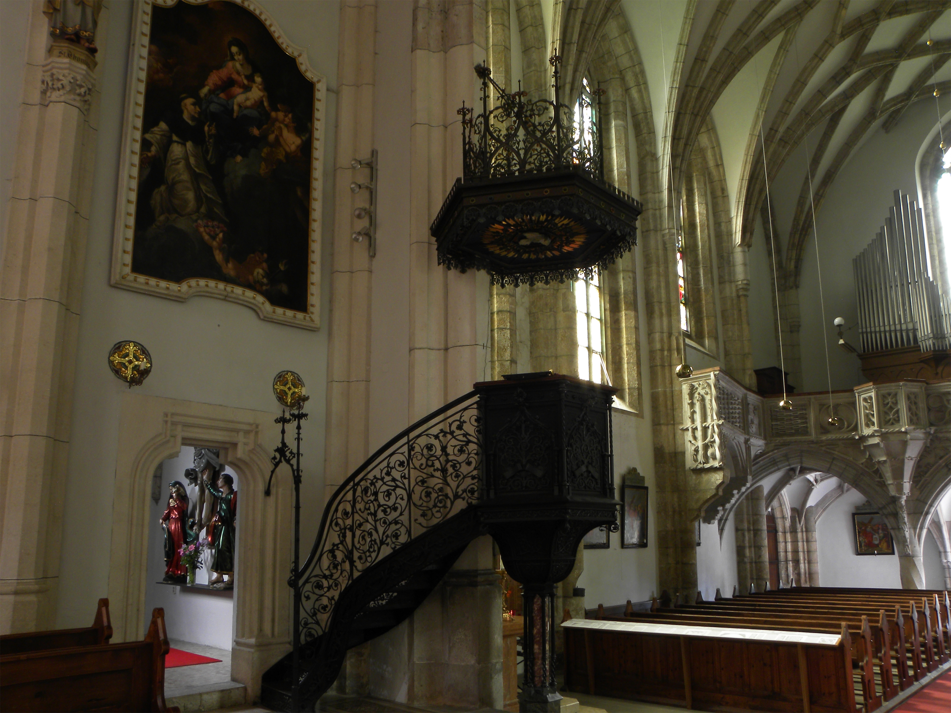 Kirchenfestungsanlage hl. Oswald - geschmiedete Kanzel mit Stein vom Erzberg im Fuß; links oben ehem. Seitenaltarbild von Christian Malur, 1774, zeigt den hl. Dominikus vor der Muttergottes.